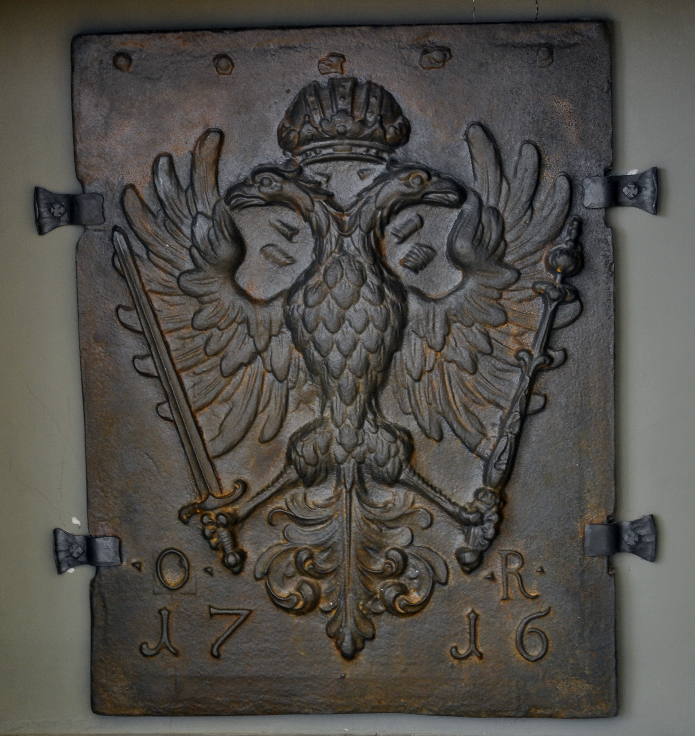 Weingarten (Württemberg), Schlössle (Stadtmuseum), Saal mit Stuckdecke, Ofenplatte im Kamin